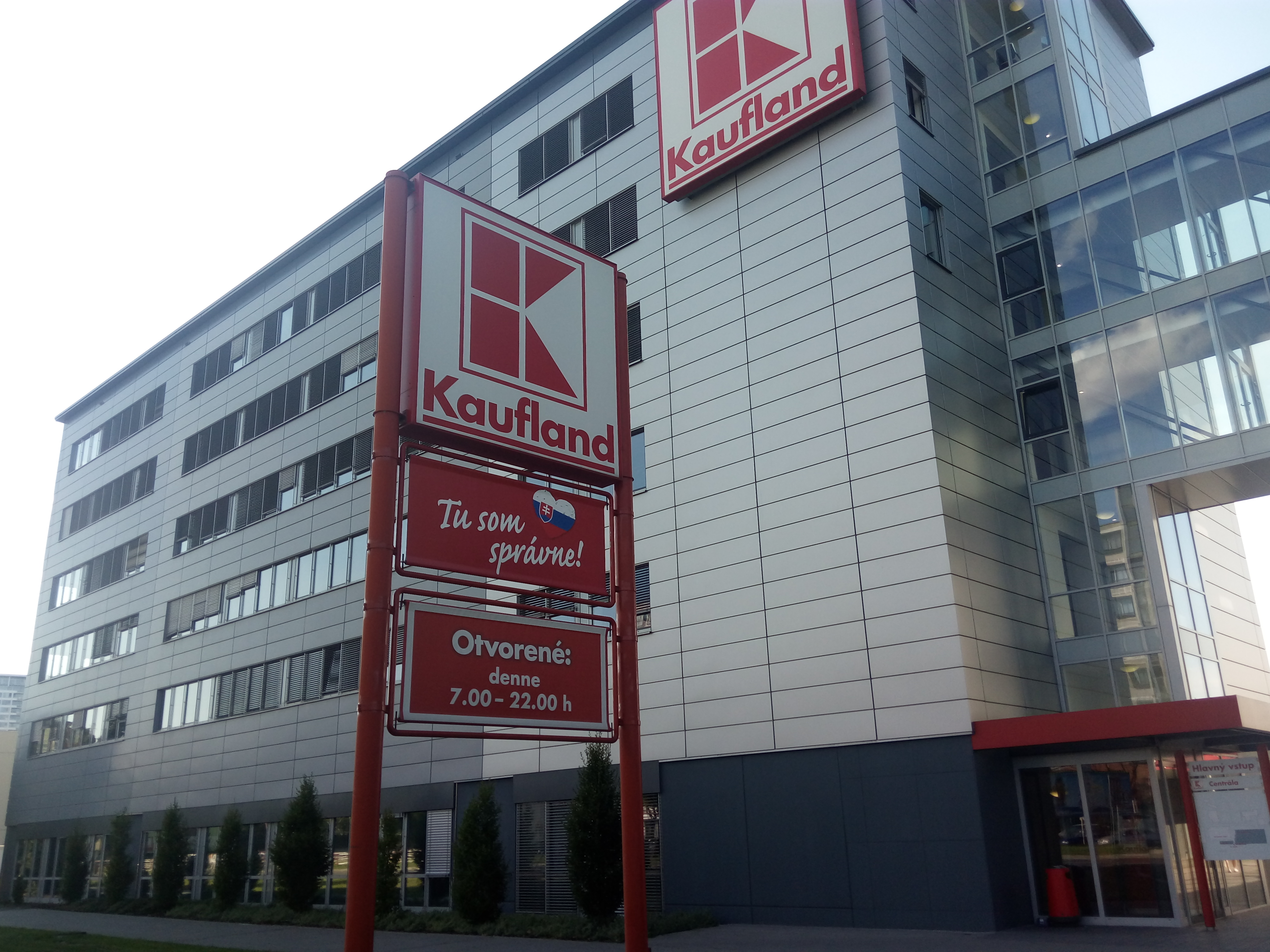 Trnavská cesta 41/A, Ružinov, Bratislava